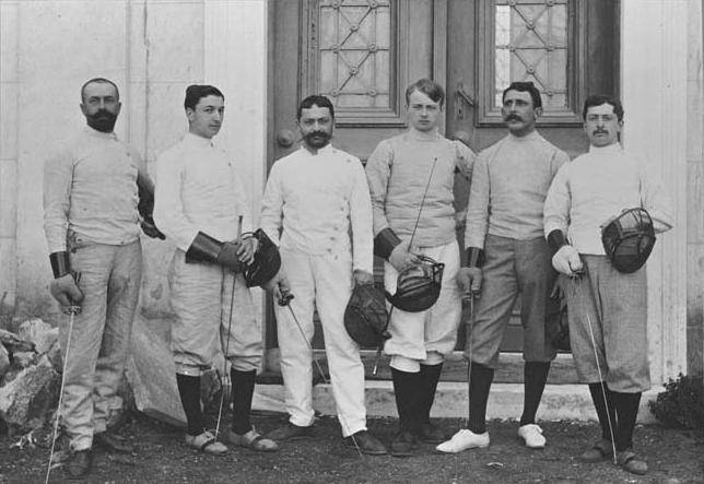 La squadra francese di scherma ad Atene 1896